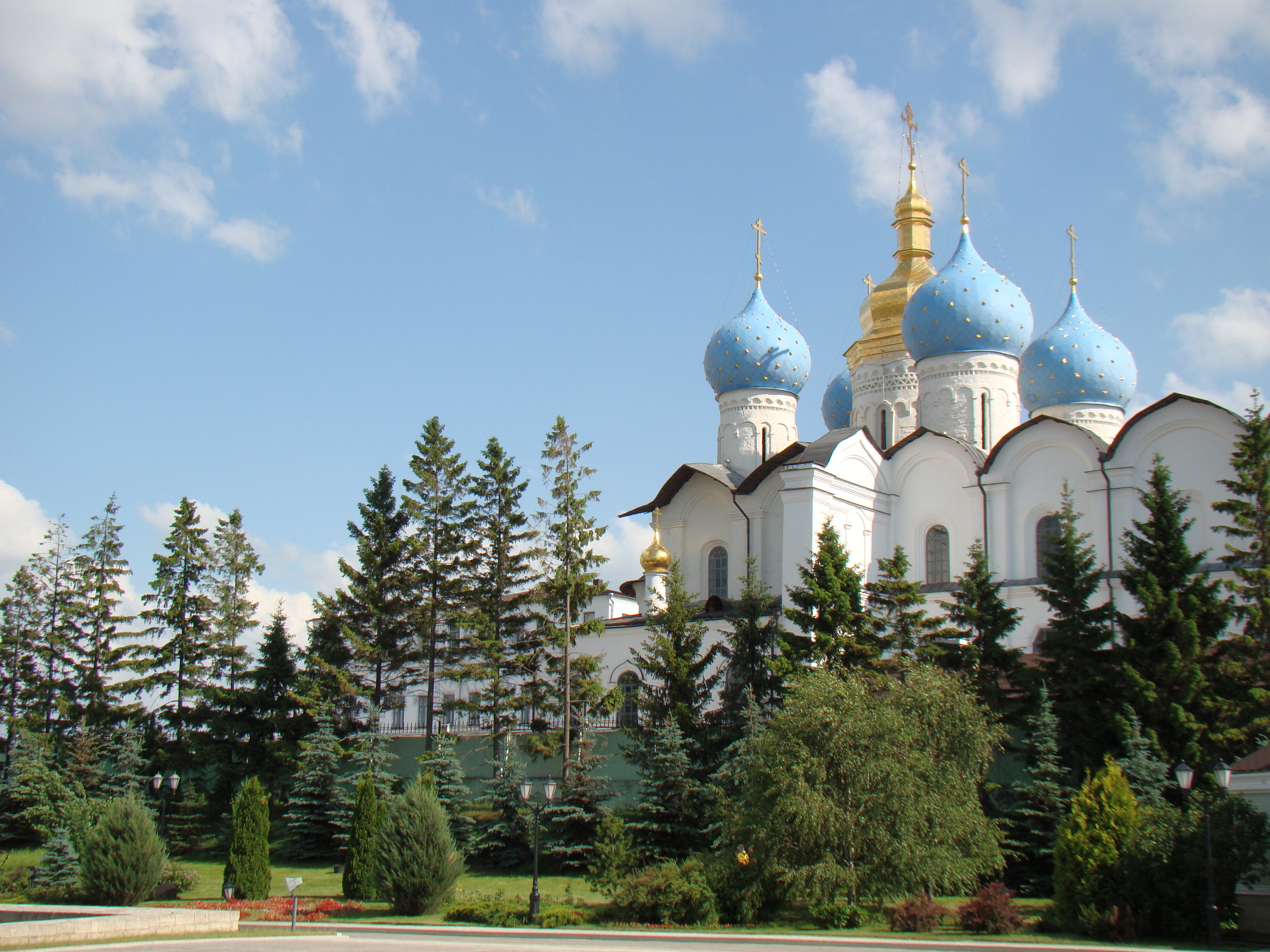 Благовещенский собор, Казань. Вид со стороны резиденции президента Татарстана.